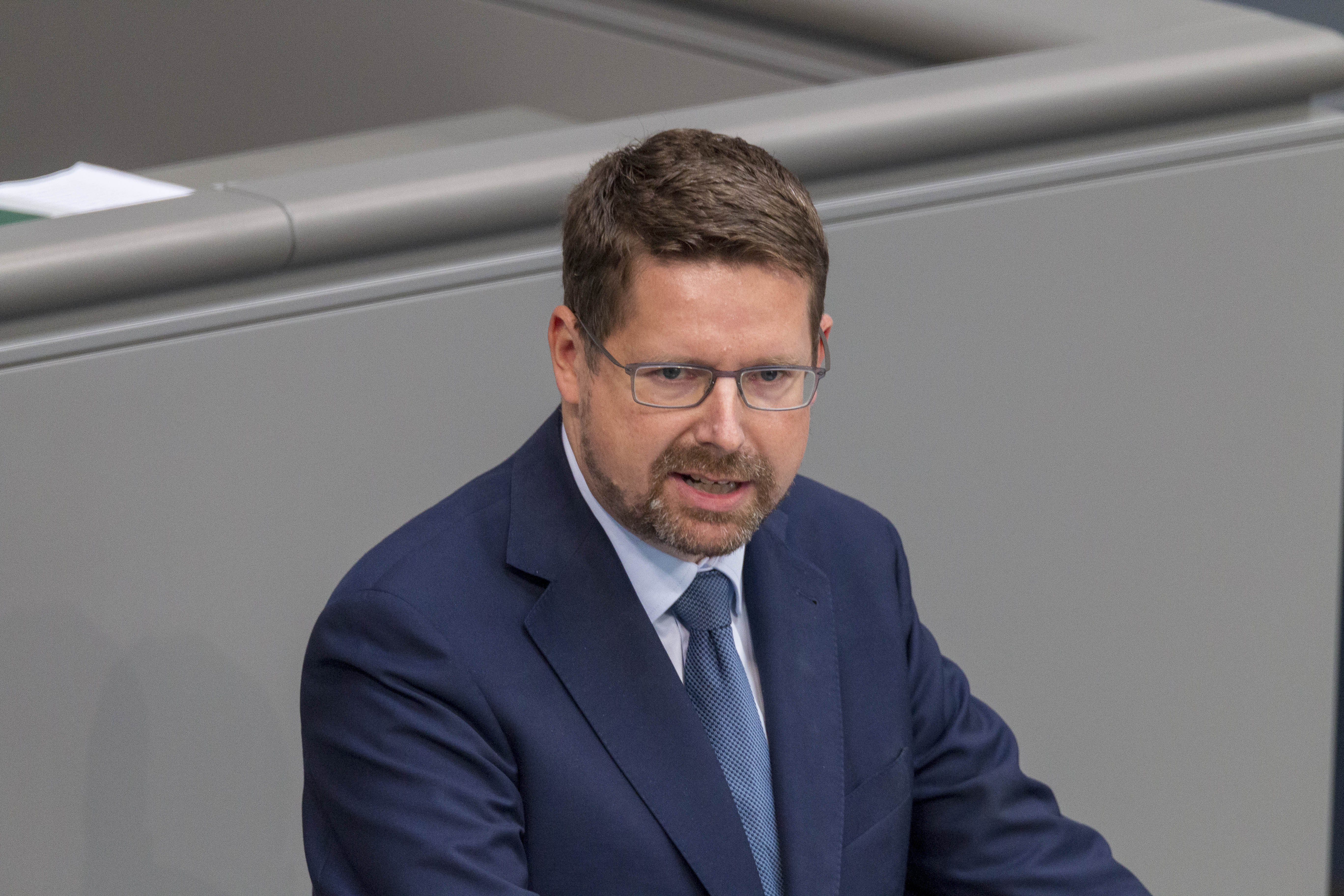 Stephan Stracke, Bundestagsabgeordneter der CSU während der Plenarsitzung des Deutschen Bundestages am 2. Juli 2020 in Berlin.